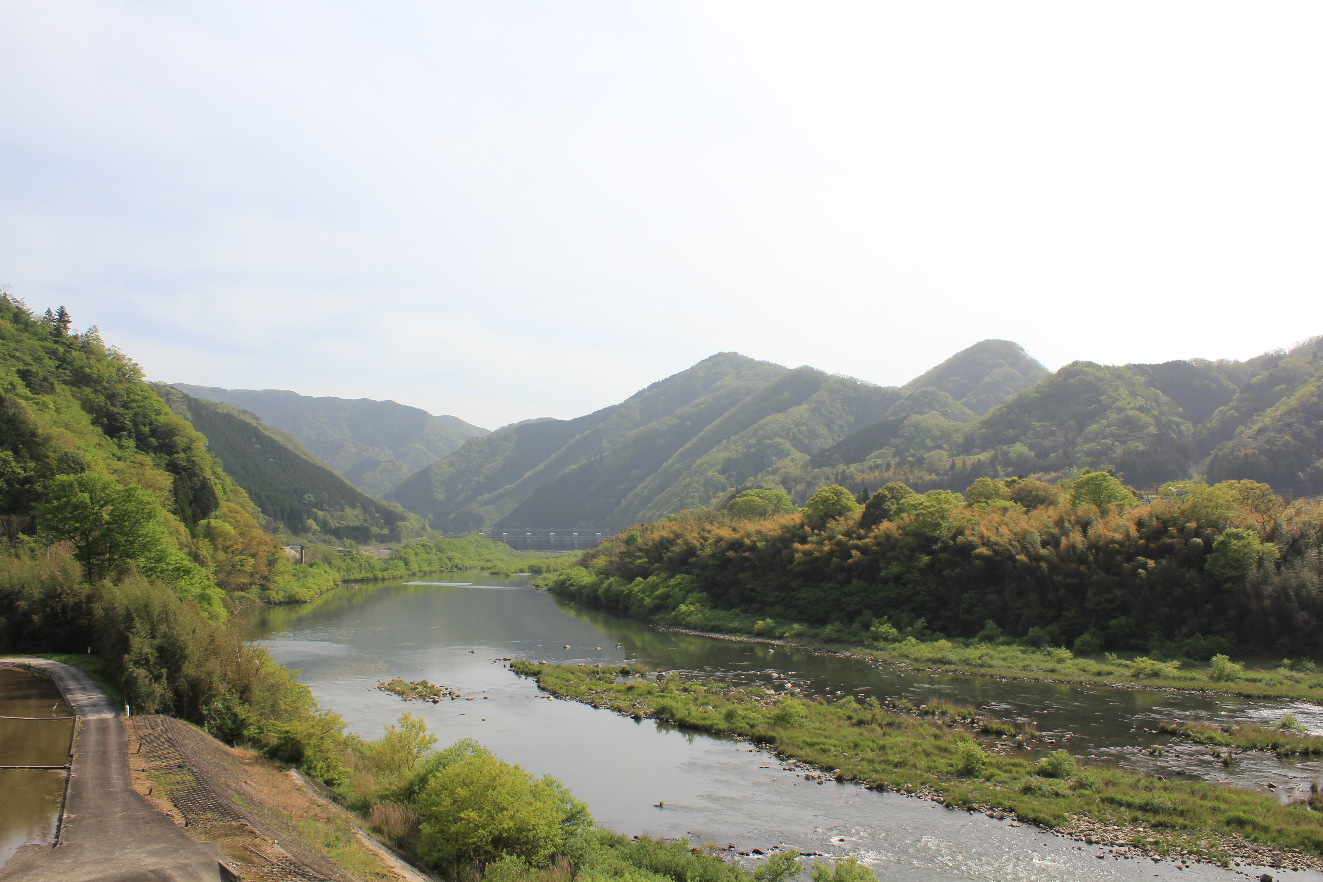 浜原ダムと丸屋城、青杉ヶ城、安右エ門城